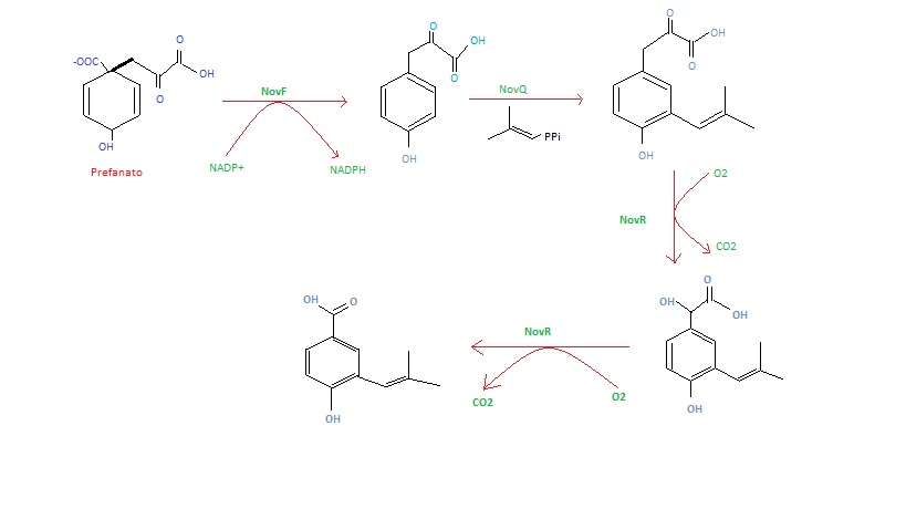 Anillo A